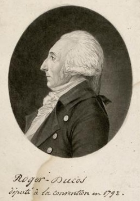 Pierre Roger Ducos par Edme Quenedey.